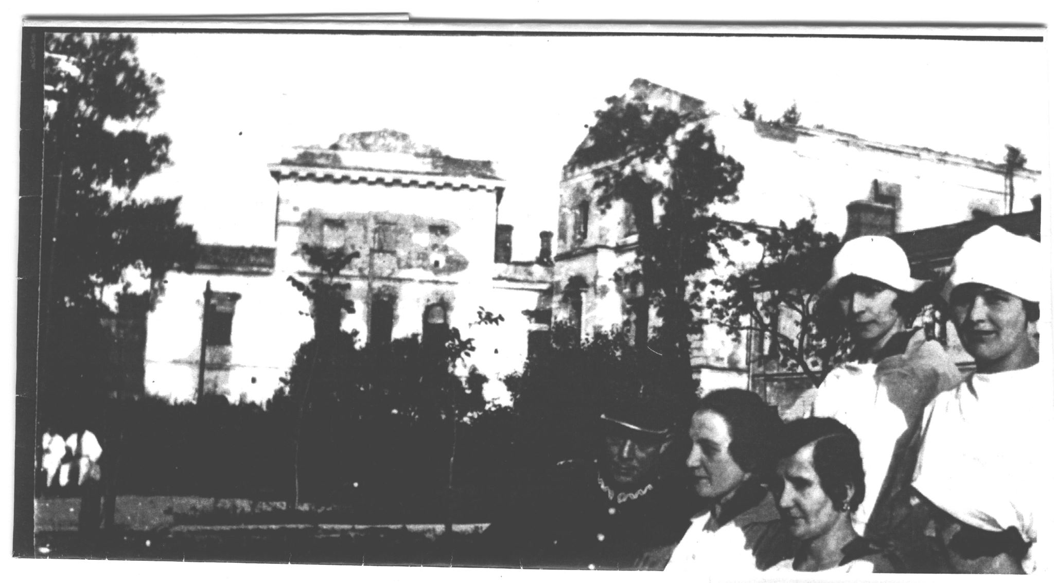 Беларуская (тарашкевіца): Берасьце (Bieraście), пляц Бэрнардынскі (plac Bernardynski)